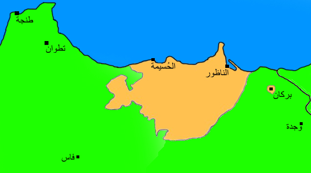 خارطة لقسمٍ من المغرب تظهر فيها المنطقة حيثُ تنتشر لهجة تريفيت الأمازيغيَّة.